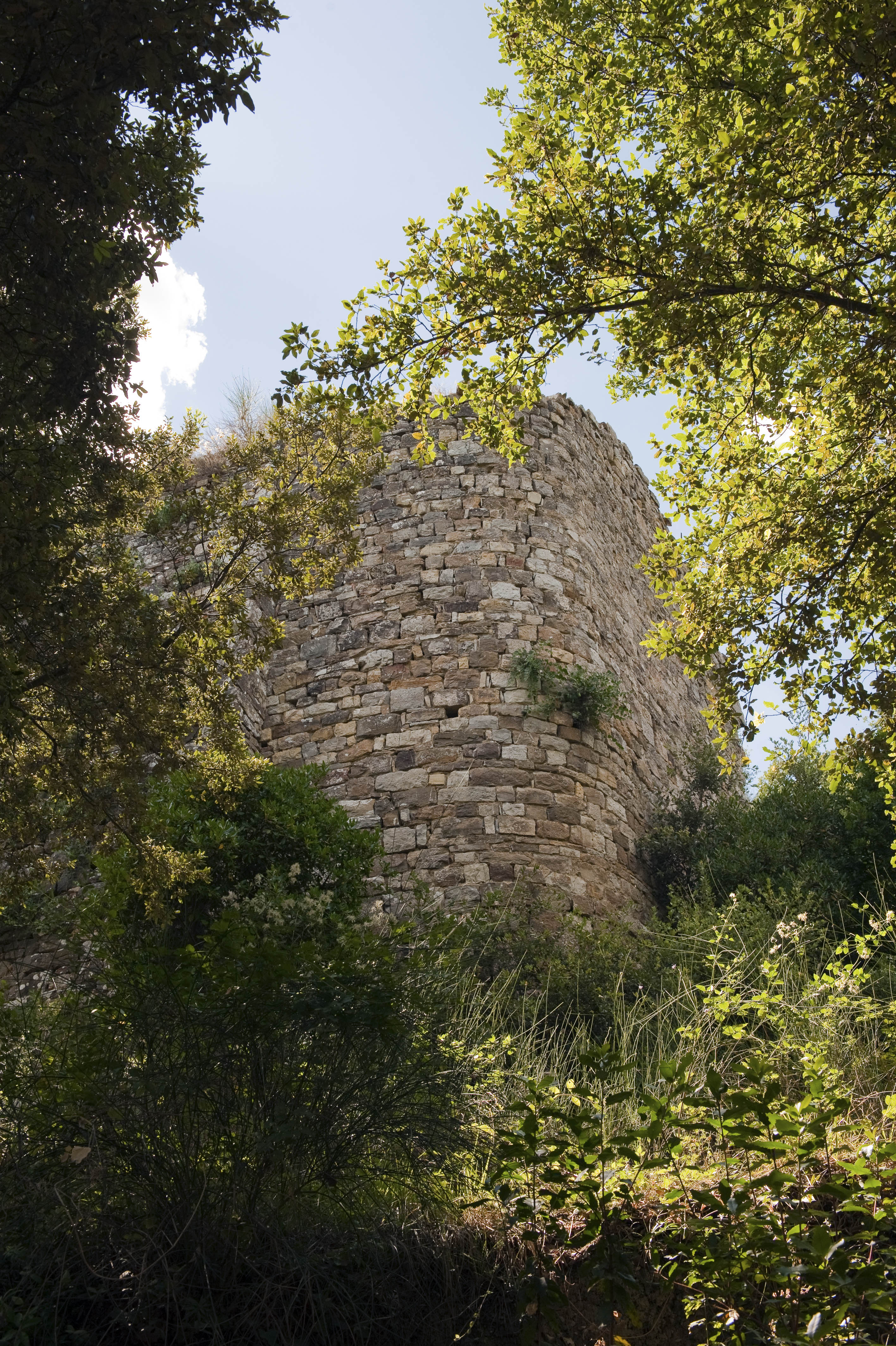 Torre del Castello di Monternano (Castellina in Chianti)